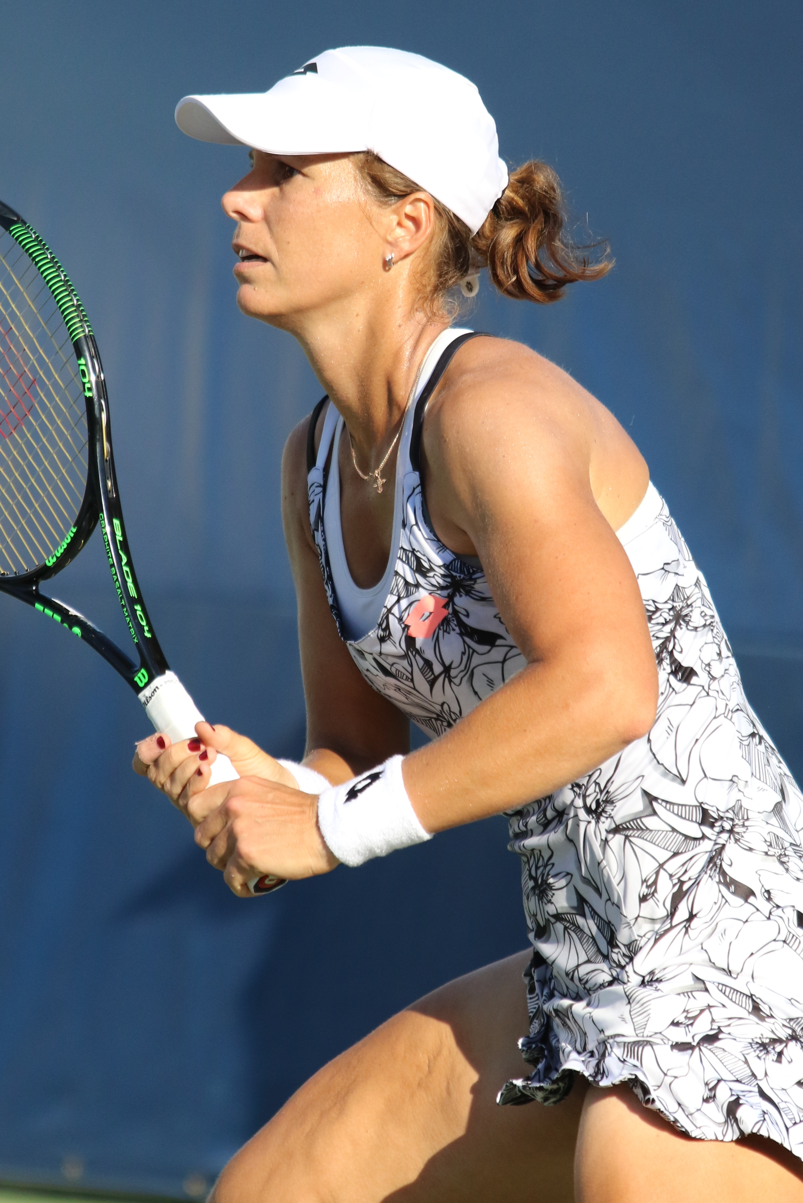 Lepchenko US16 (19)